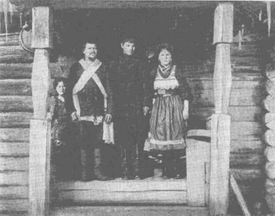 "Дружка" с женихом и невестой на свадьбе старожилов (РЭМ, № 5572-39)